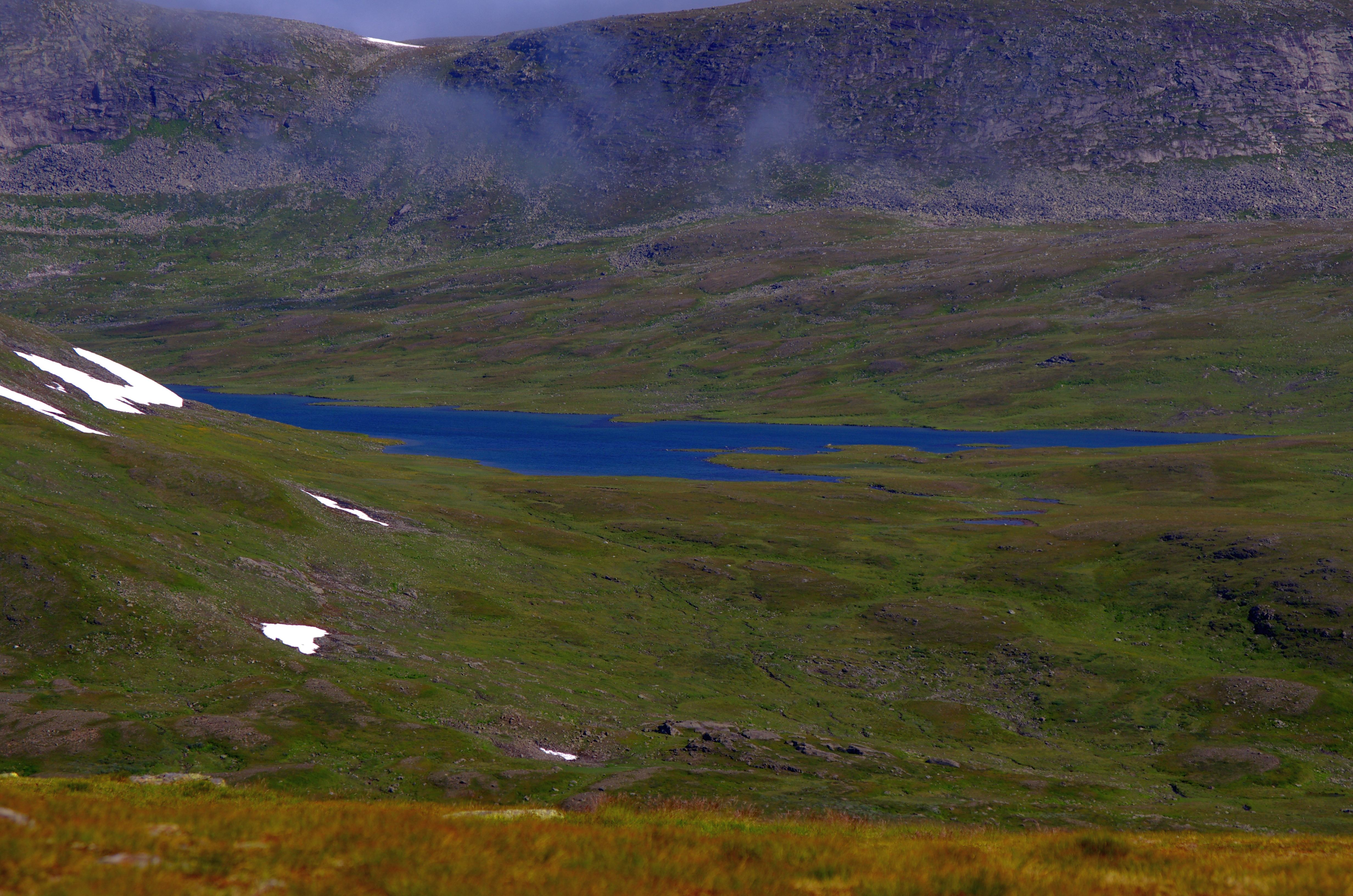 Skirajaure eller Skijrájávrrie är en sjö i Sorsele kommun i Lappland i Sverige.